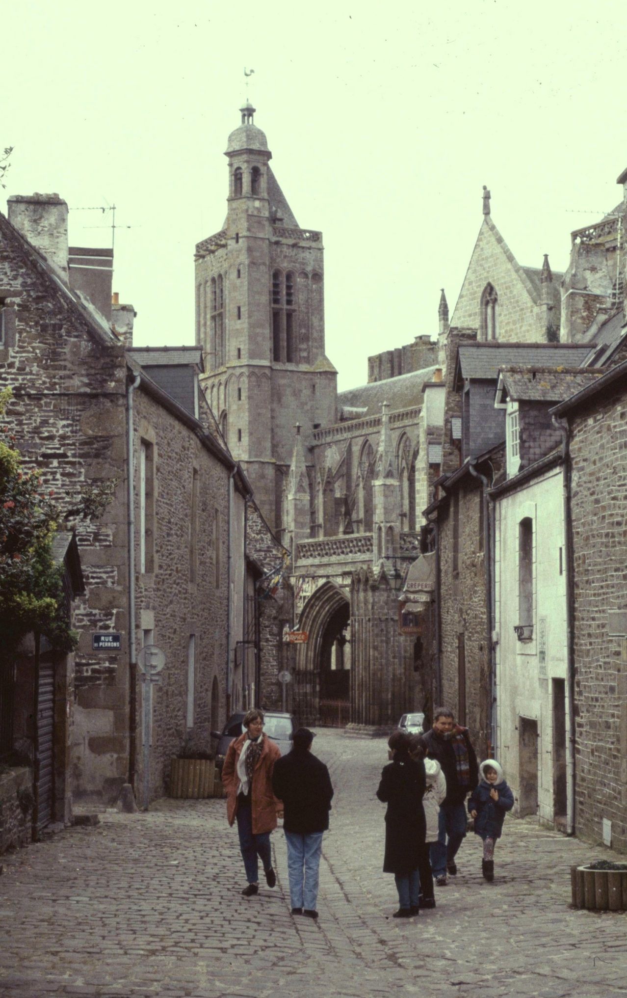 Ille-Et-Vilaine Dol-De-Bretagne Rue Ceinte Vue Cathedrale